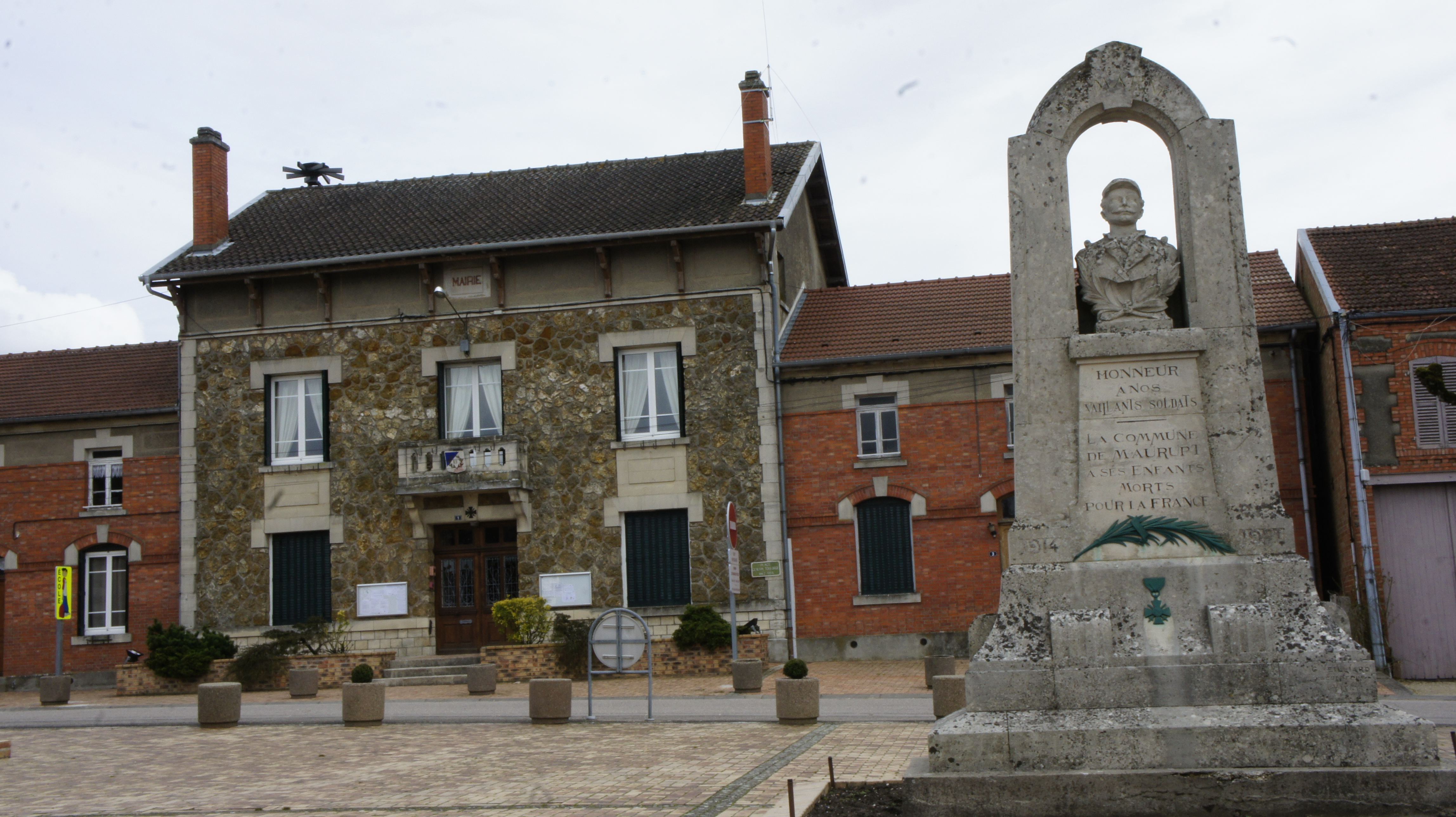 Une vue de la Mairie et du monument aux morts de Maurupt-le-Montois .